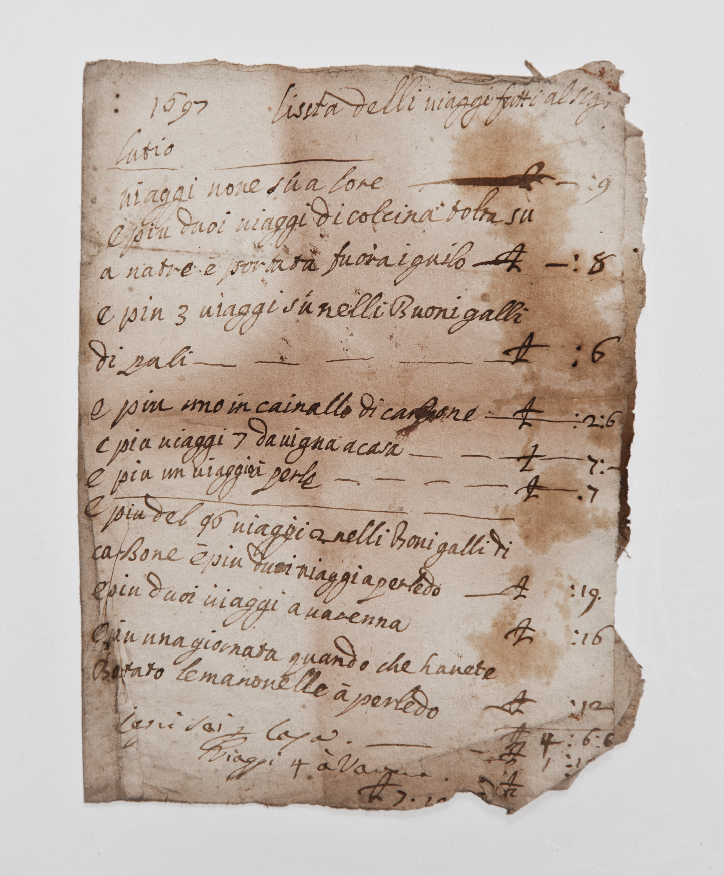 Archivio Pietro Pensa, Esino, Atti privati